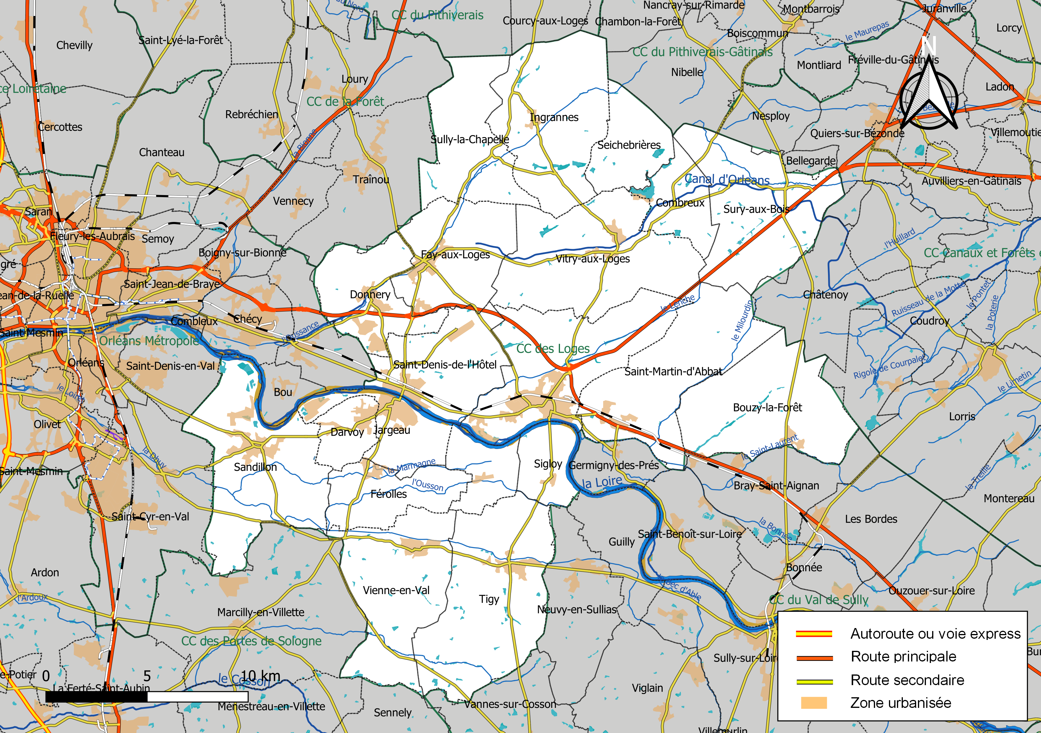 Carte géographique de la communauté de communes des Loges, département du Loiret, France. Composition au 1er janvier 2019.